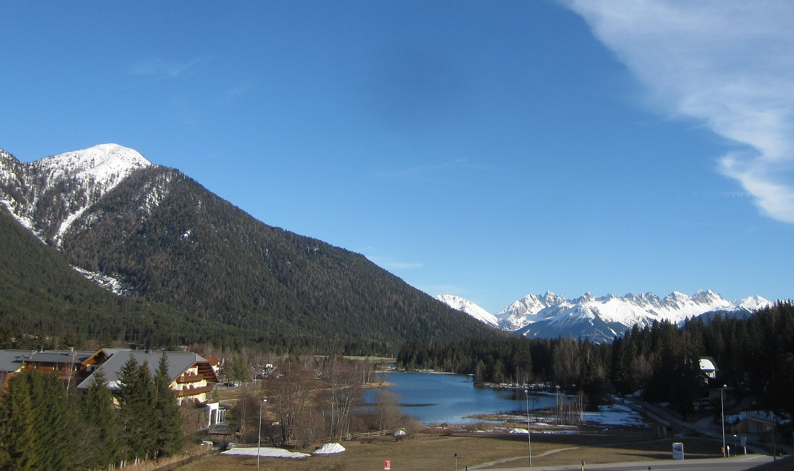 Wildsee bei Seefeld in Tirol - Wildsee lake, Seefeld (Tirol) This media shows the natural monument in the Tyrol with the ID ND_3_1. (other)